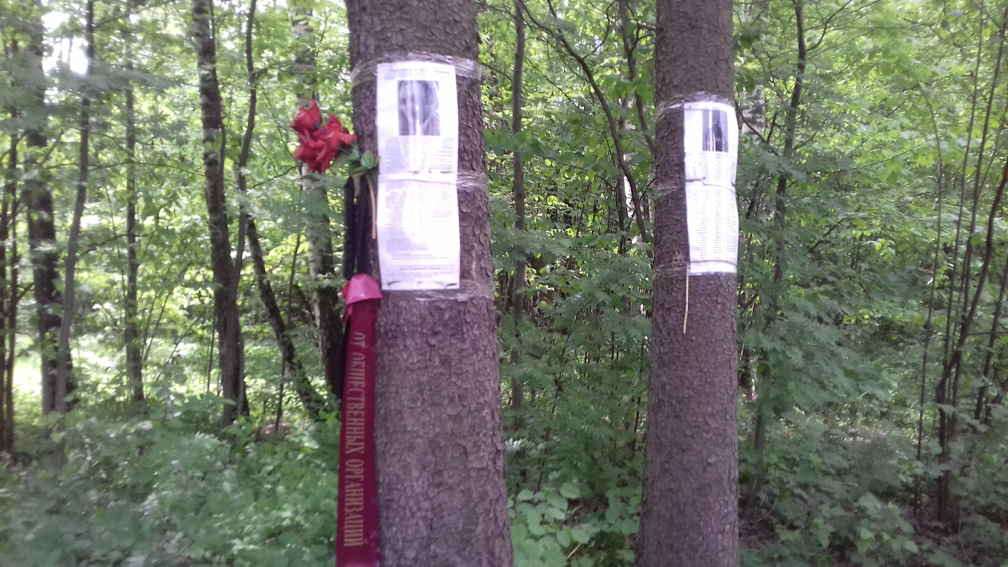 Спецобъект «Коммунарка» - место расстрелов жертв политических репрессий: Сосенский сельский округ, 24-й км Калужского шоссе, Новомосковский округ, Москва